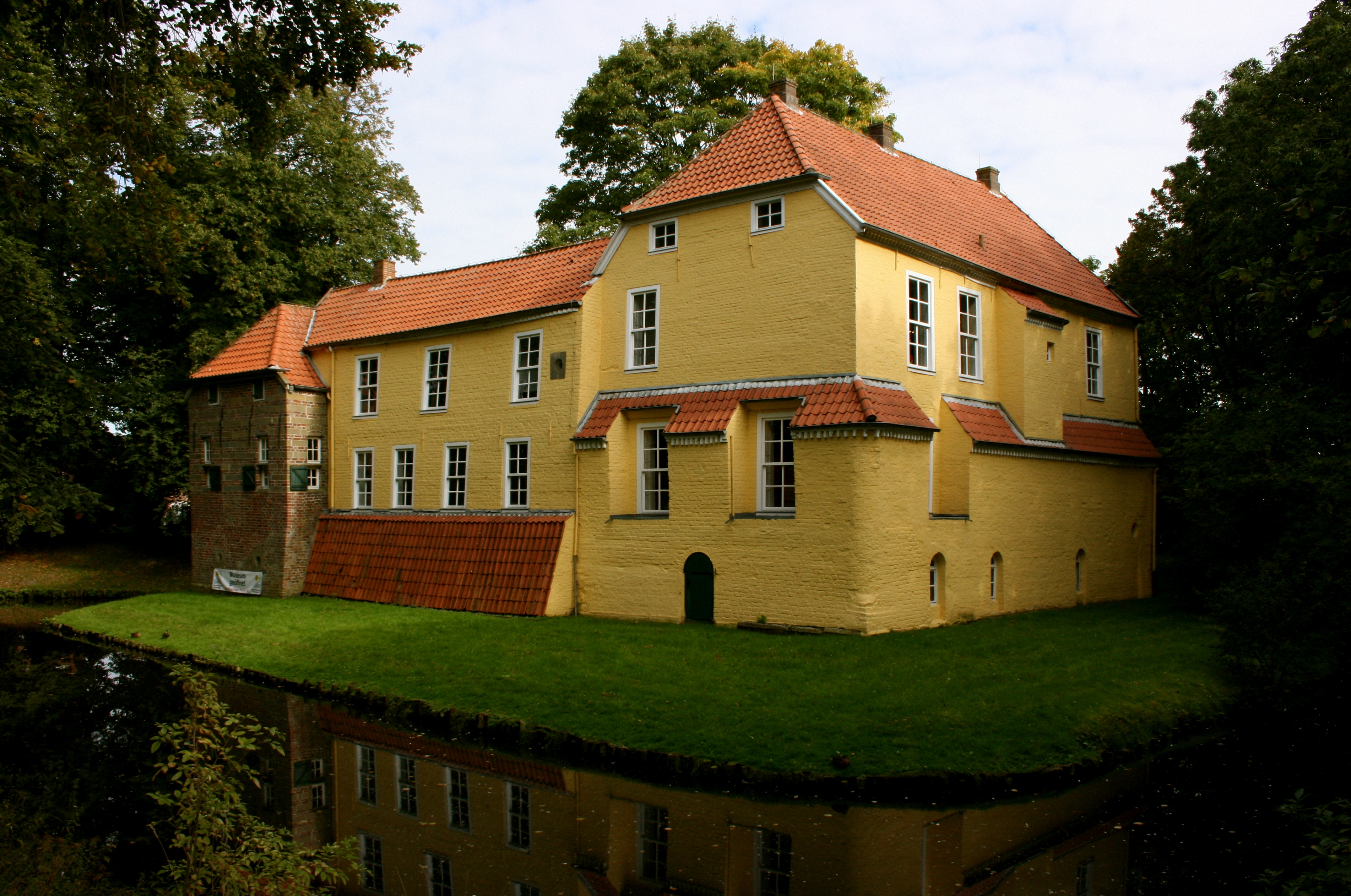 Manningaburg in Pewsum